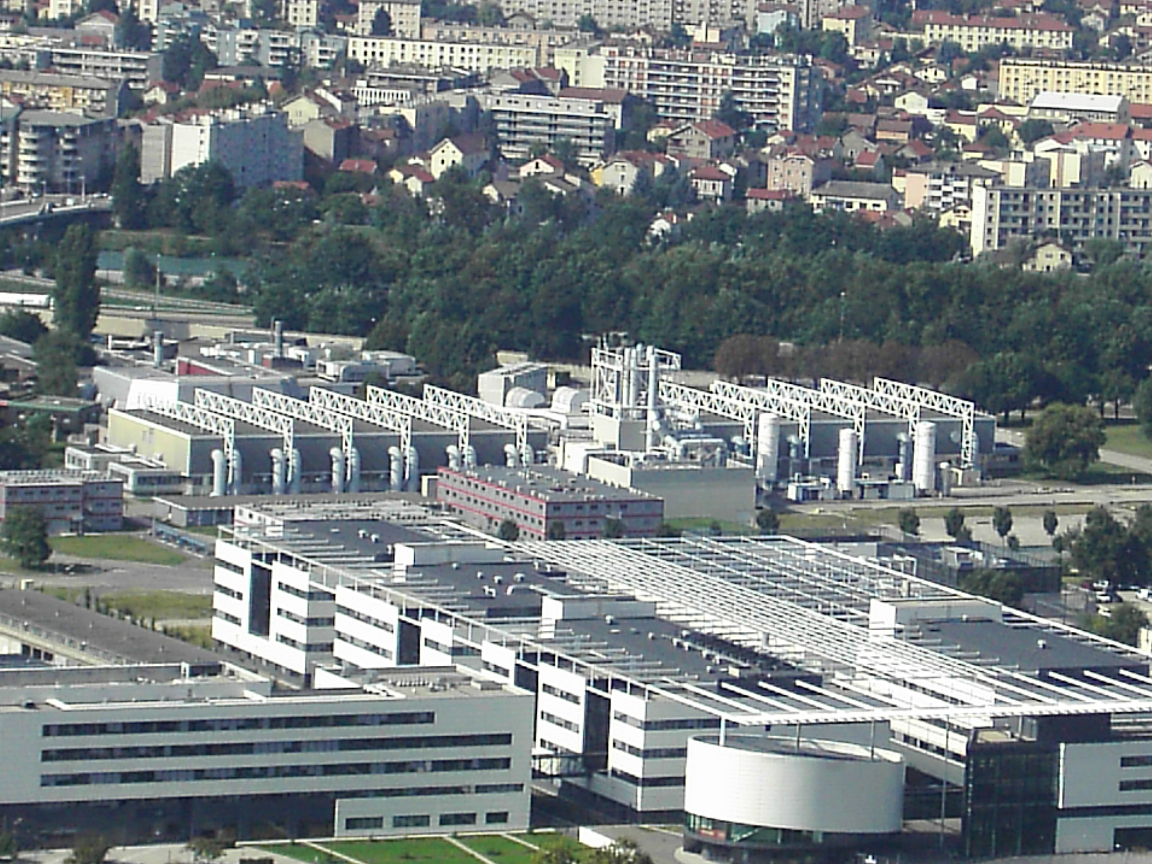 Le LETI (Laboratoire d'Électronique des Technologies de l'Information) installé juste derrière MINATEC (Micro & Nano Technologies) -- Grenoble